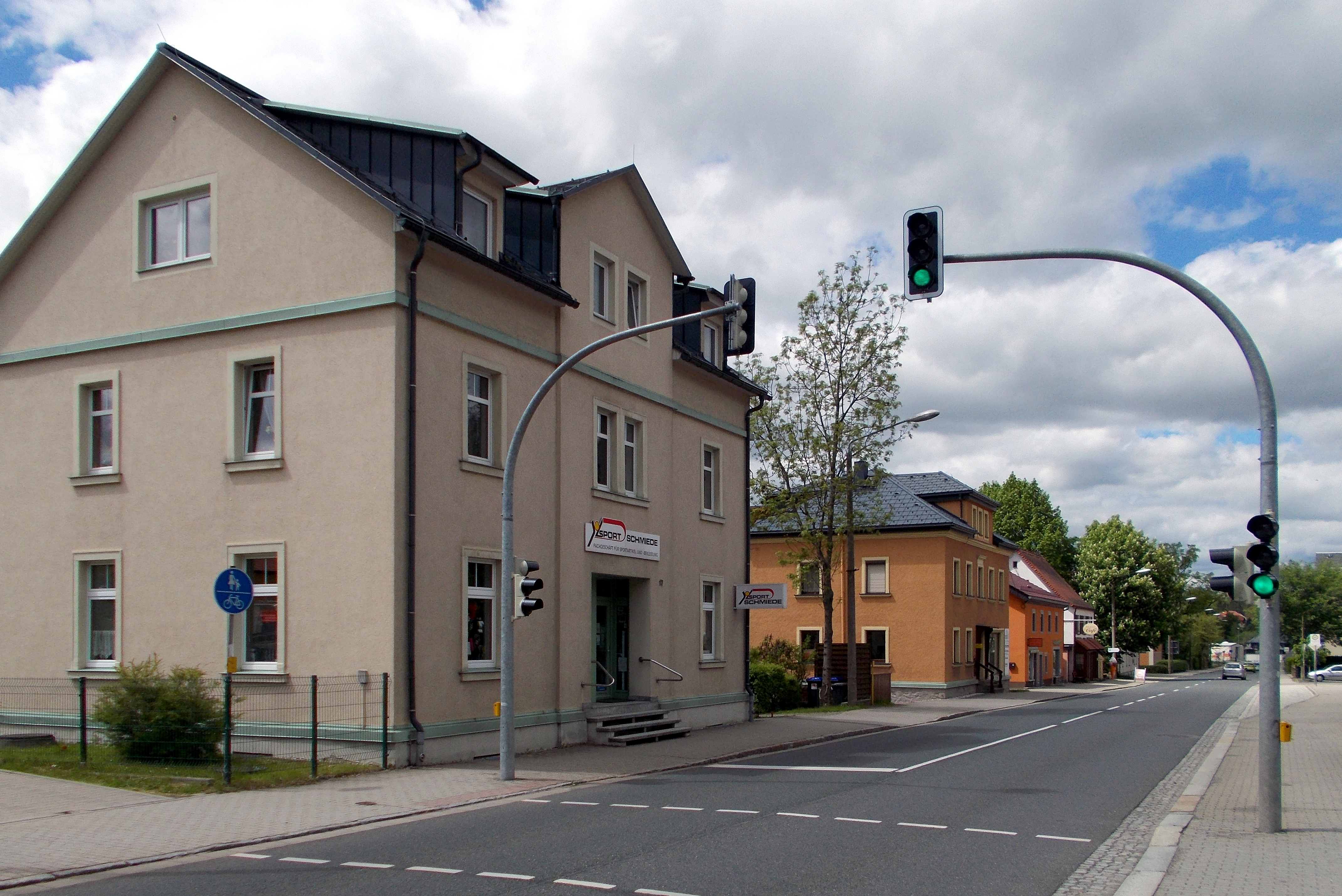 Dokumentation der Altenberger Straße in Schmiedeberg - Blick vom Markt in Richtung Norden